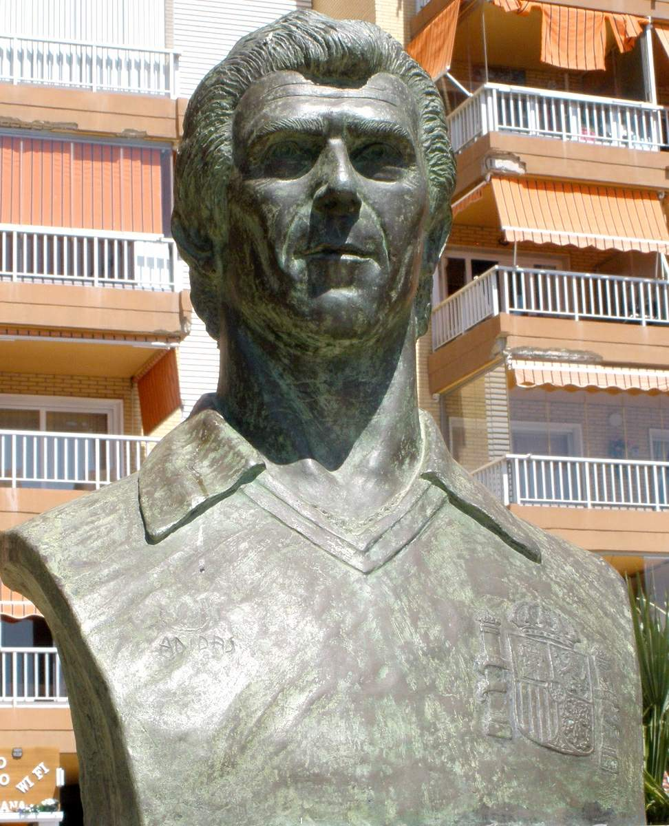 Monumento Juan Gómez González, 'Juanito', en su Fuengirola natal